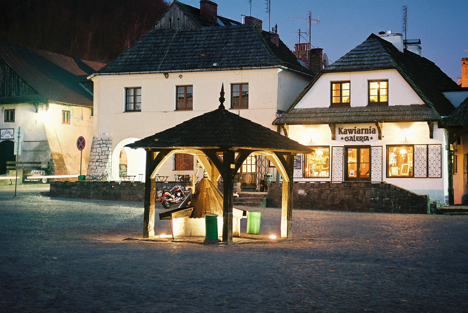 Kazimierz Dolny. Studnia na rynku